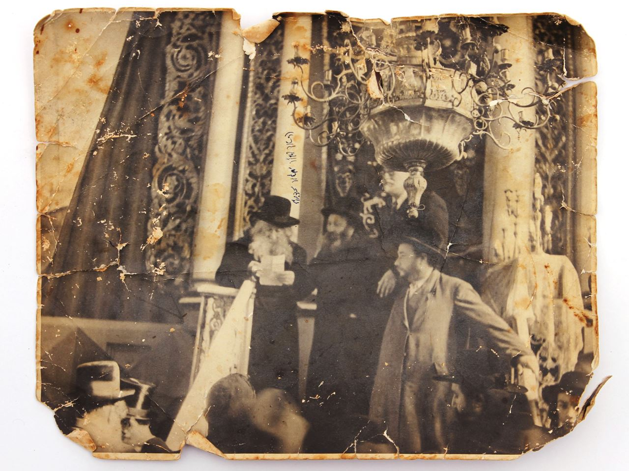 The Imrei Emes at a prayer gathering in the (old) Hurva Synagogue, Jerusalem, in November 1942, after news of the murder of the Jews of Poland arrived. הרבי מגור קורא בעצרת תפילה בבית הכנסת החורבה בירושלים בנובמבר 1942, לאחר שהגיעו ידיעות על רצח יהודי פולין